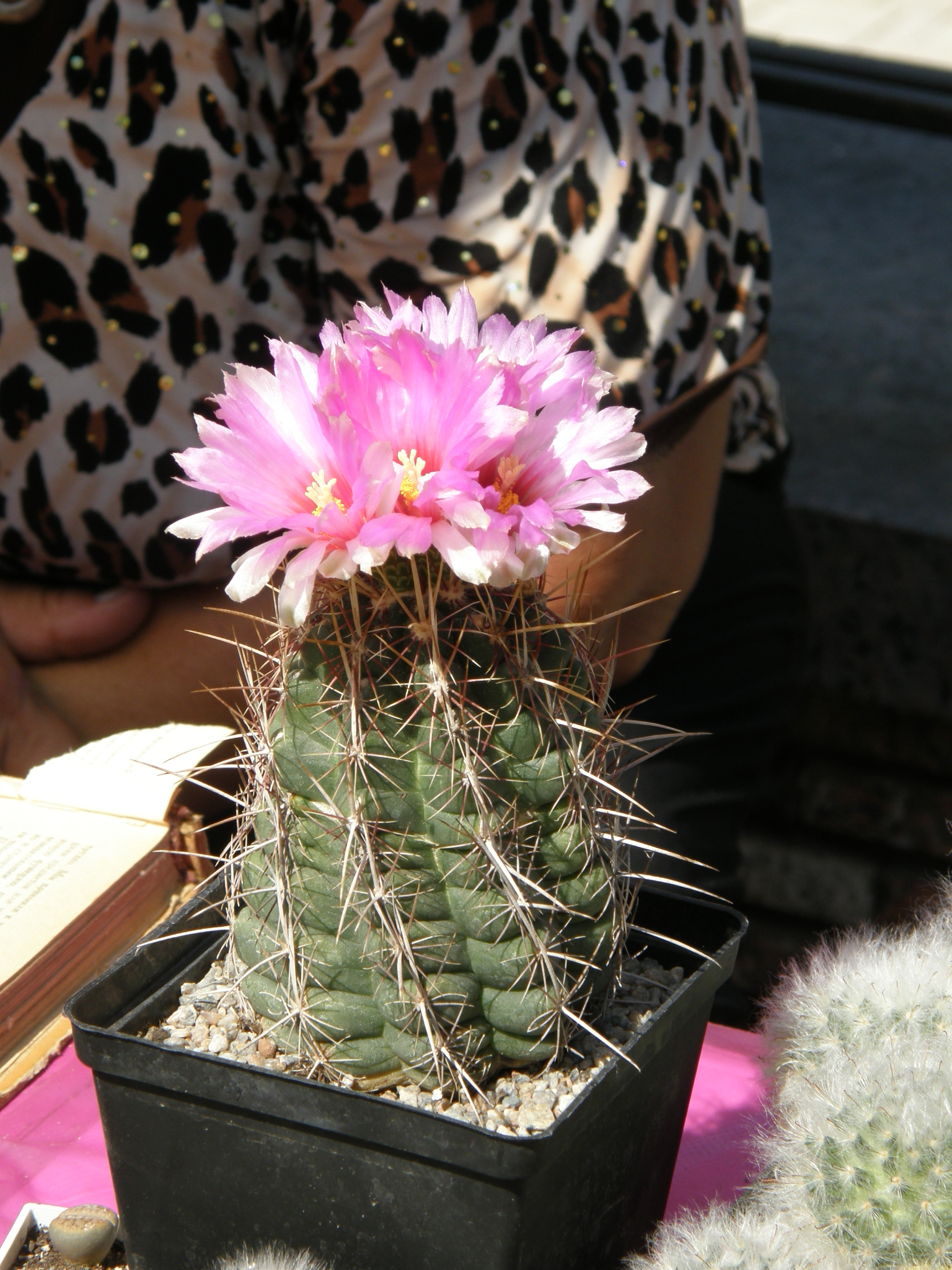 Донецк. Празднование дня города и дня шахтёра. Выставка цветов